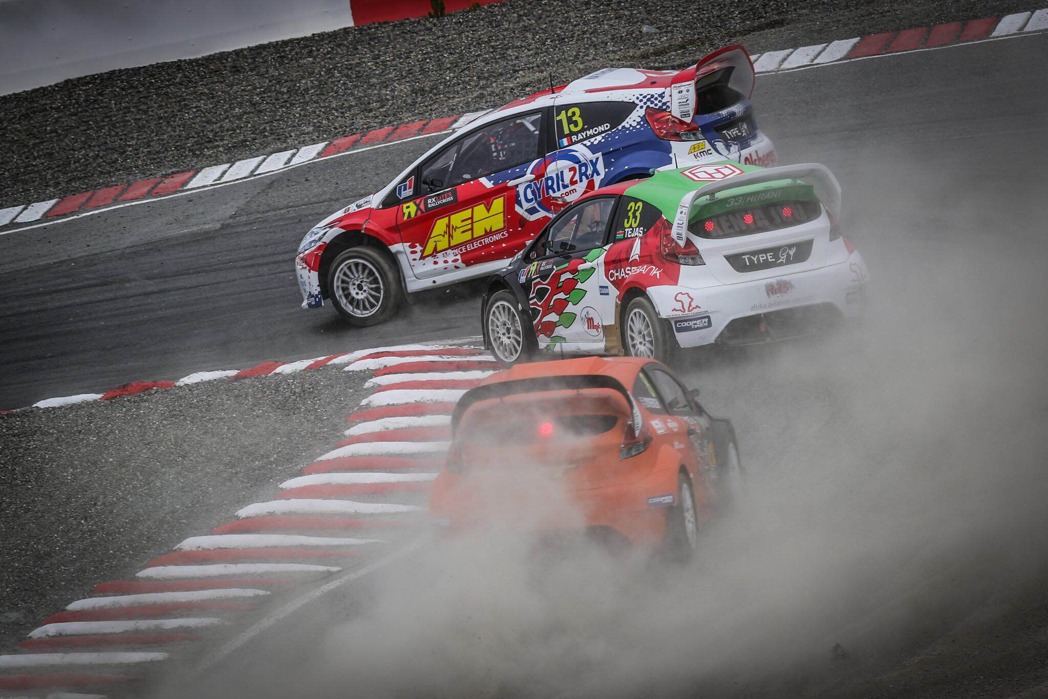 Photographie de Cyril Raymond et sa Ford Fiesta devant Tejas Herani (voiture verte et blanche) et une autre voiture orange en championnat du monde de rallycross FIA en 2016 (catégorie RX Lites).